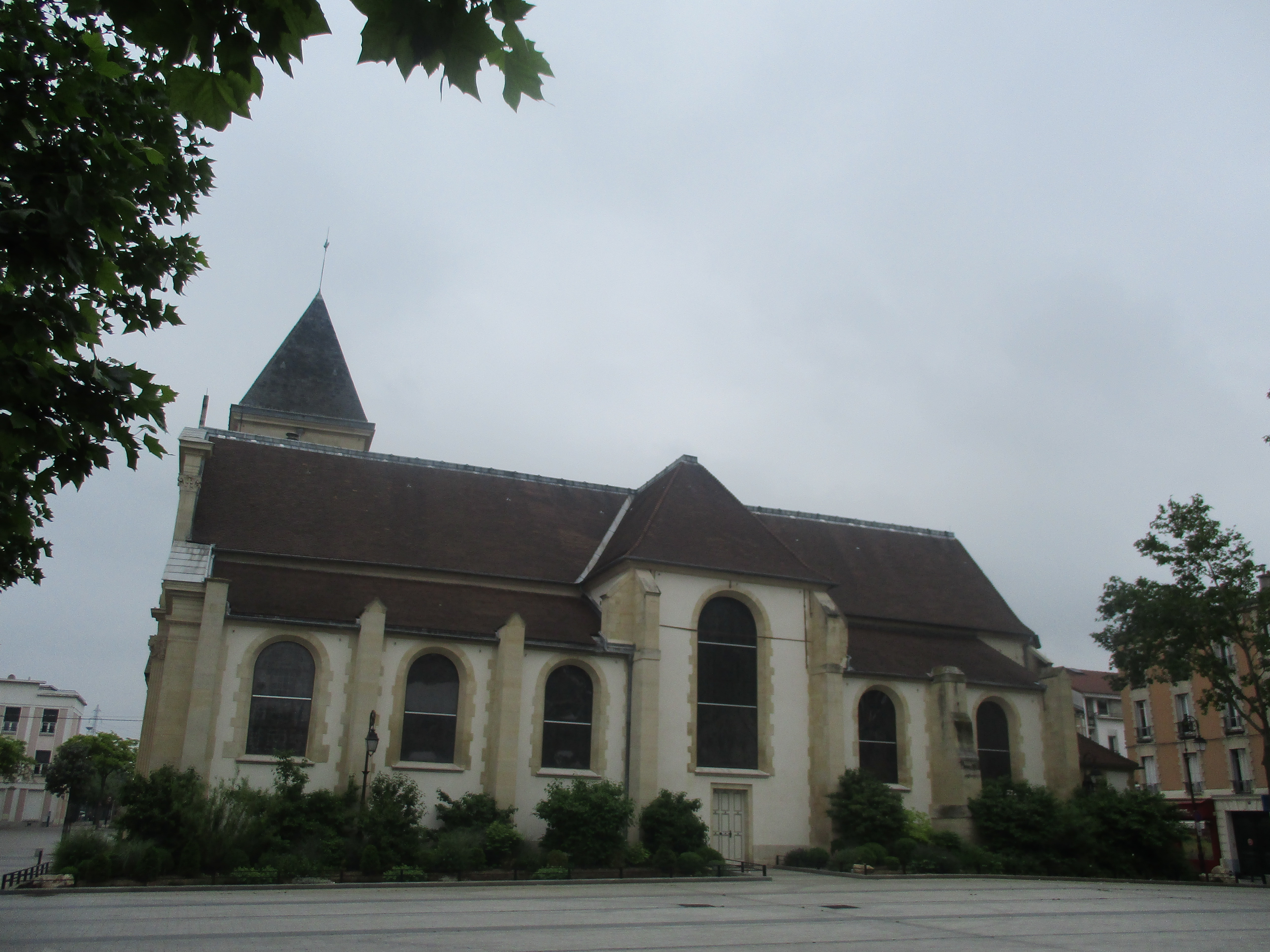 Côté Sud de l'église Sainte-Marie-Madeleine de Gennevilliers, donnant place Jean Grandel.